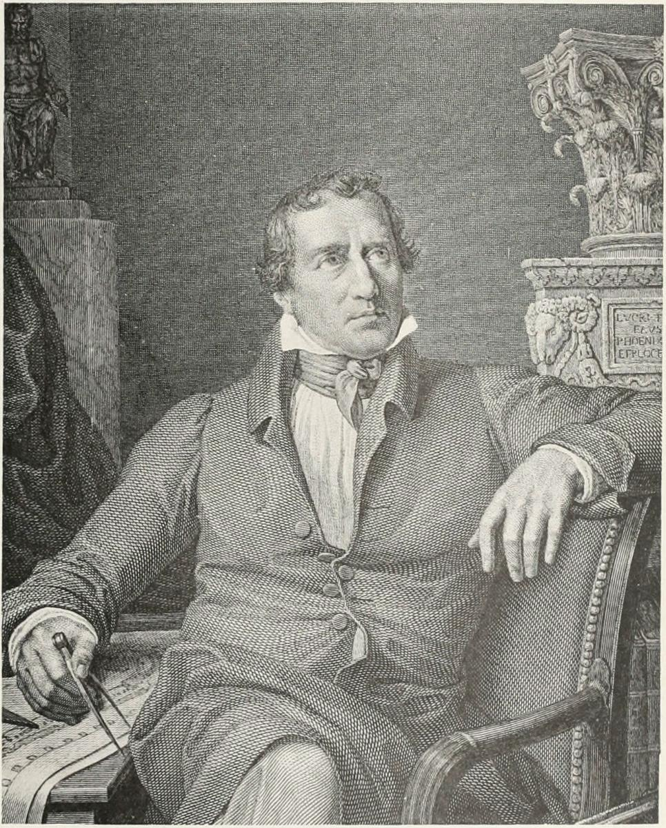 Portrait of Pierre-Alexandre Vignon